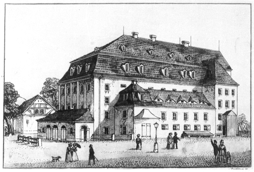 Das alte Hoftheater zu Dresden im italienischen Dörfchen (Moretti-Theater); Dresden, Stadtgeschichtliche Museen Dresden, Stadtmuseum